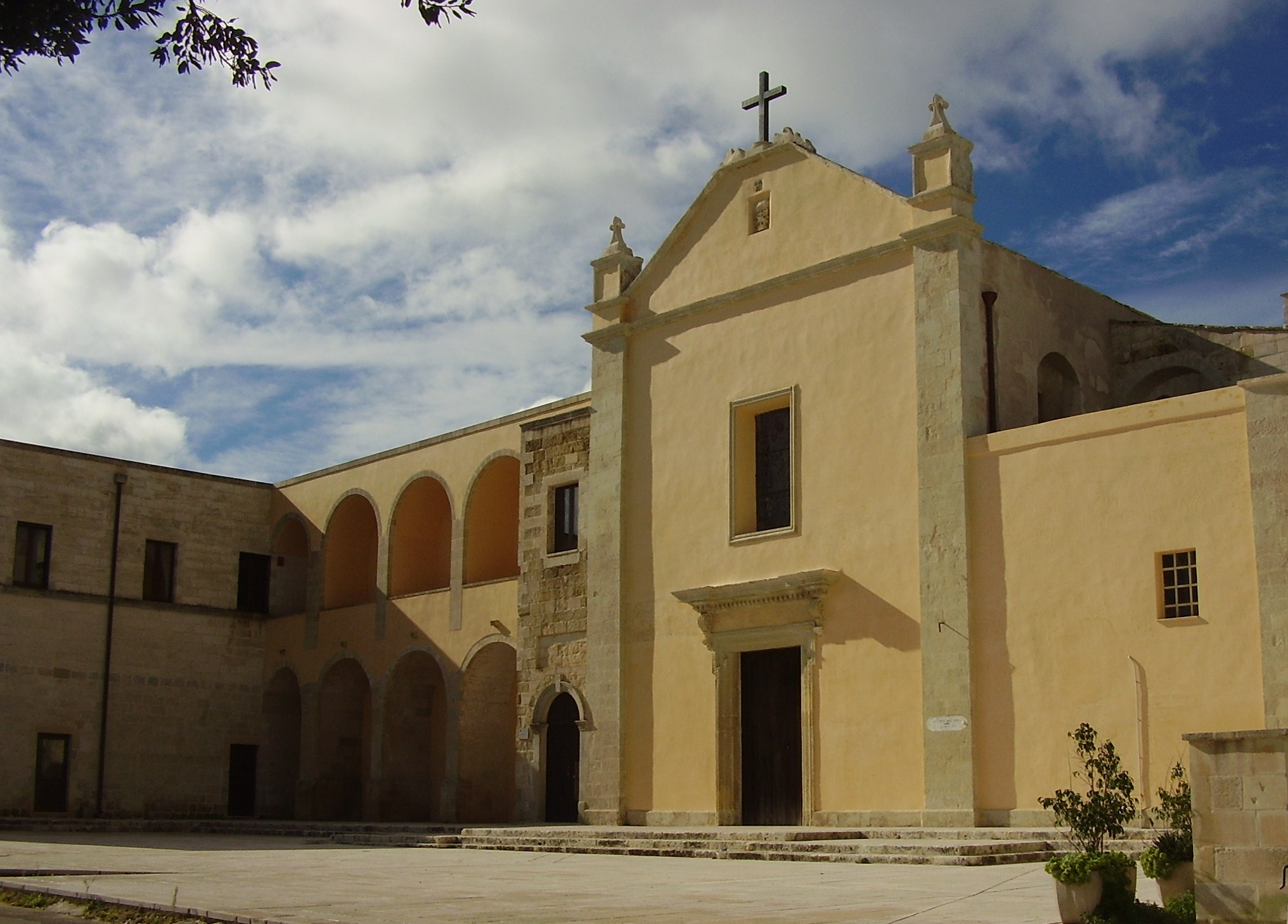 Convento Cappuccini Minervino di Lecce, Lecce